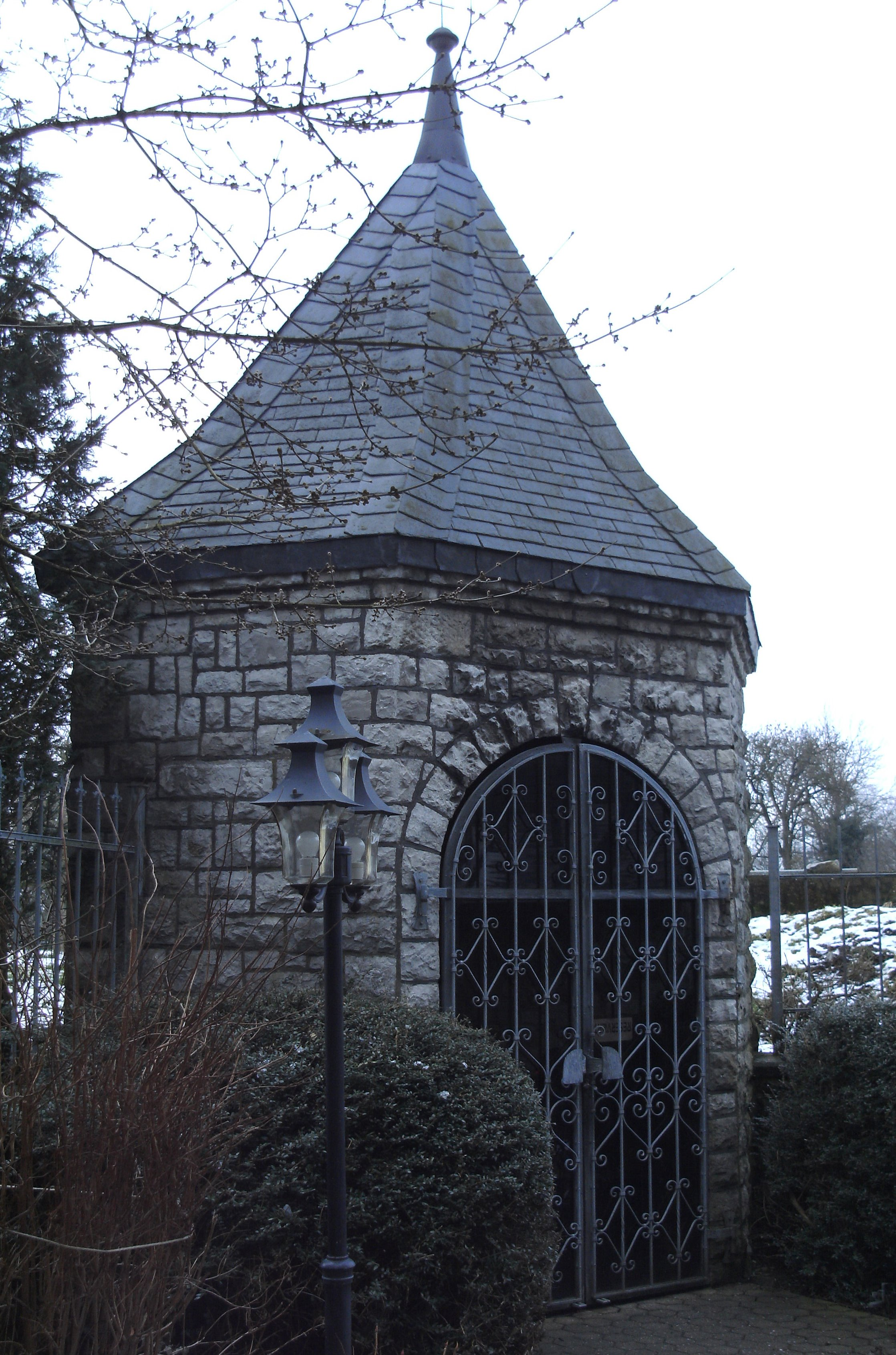 Neue Kapelle in Dorff